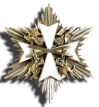 Saksan Kotkan ritarikunnan suurristin rintatähti.